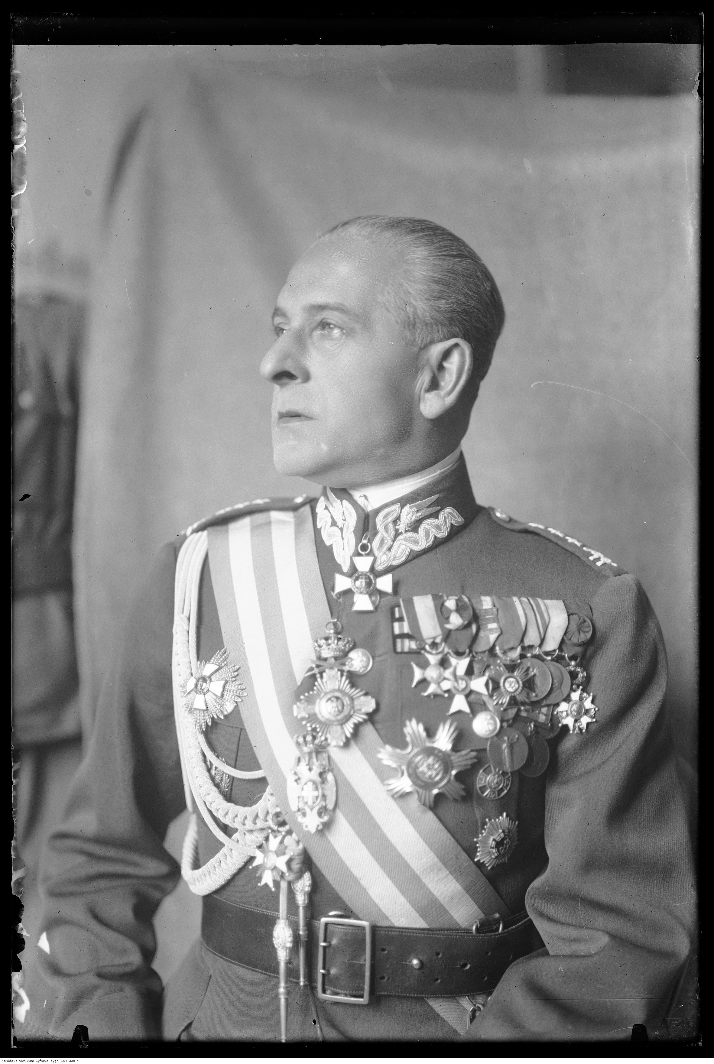 Bolesław Wieniawa-Długoszowski, pułkownik - fotografia pozowana.